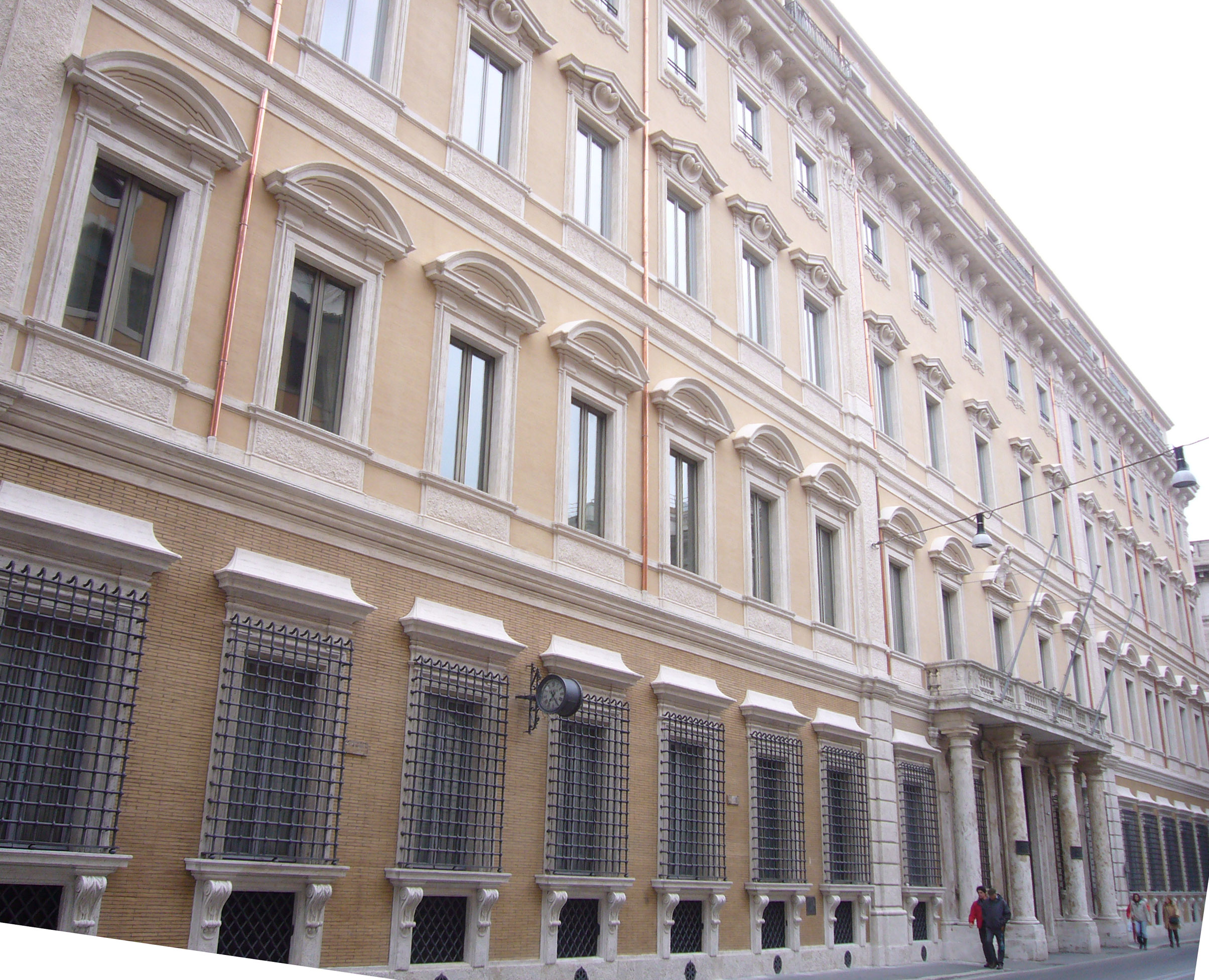 Roma, via del Corso 307. Palazzo de Carolis (oggi Banca Roma-Unicredit) restaurato